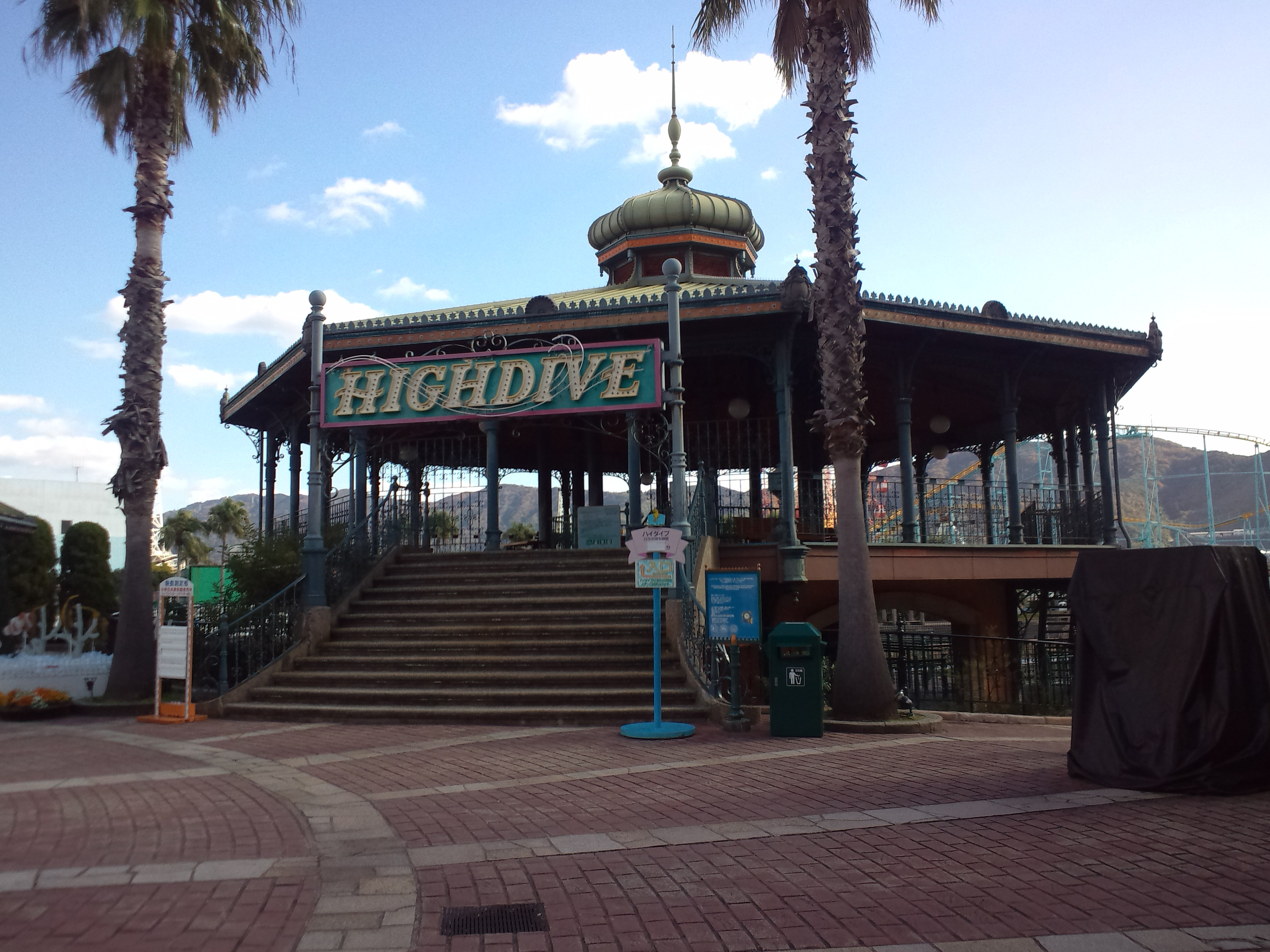 ポルトヨーロッパ 「ハイダイブ」の入口